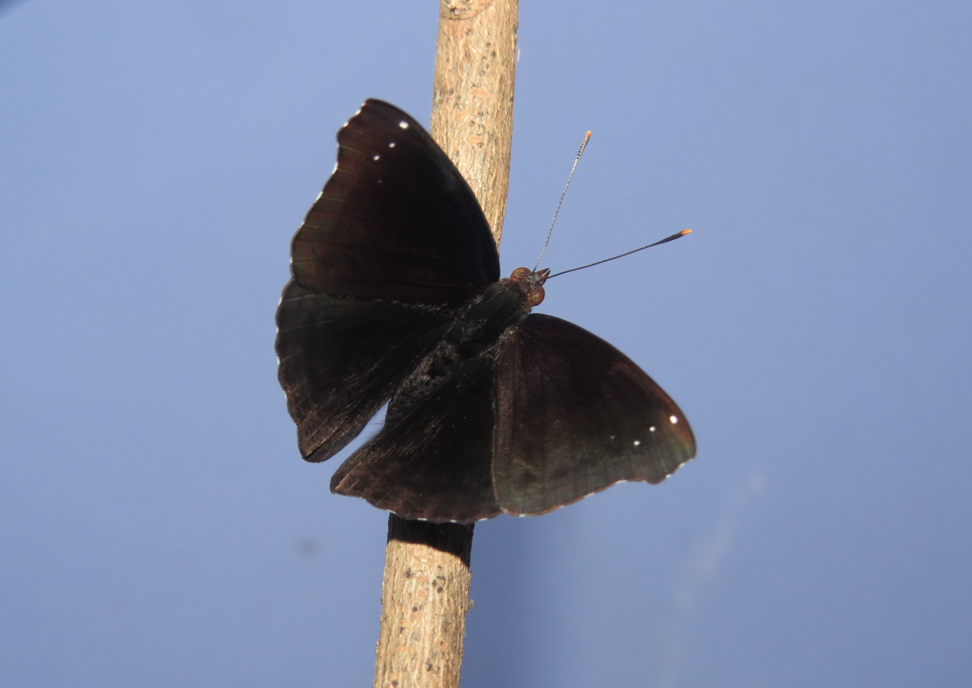 Rohana parisatis Westwood, 1850 – Black Prince at Periya, Wayanad